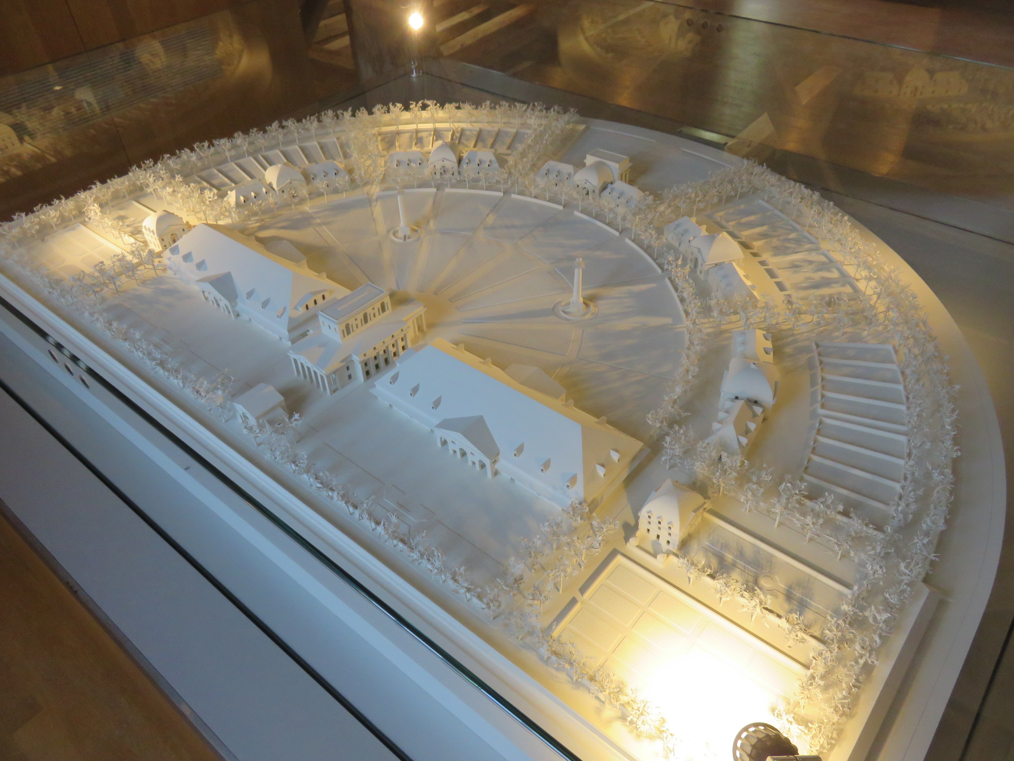 Musée Claude-Nicolas Ledoux d'Arc-et-Senans, maquette de la Saline Royale d'Arc et Senans